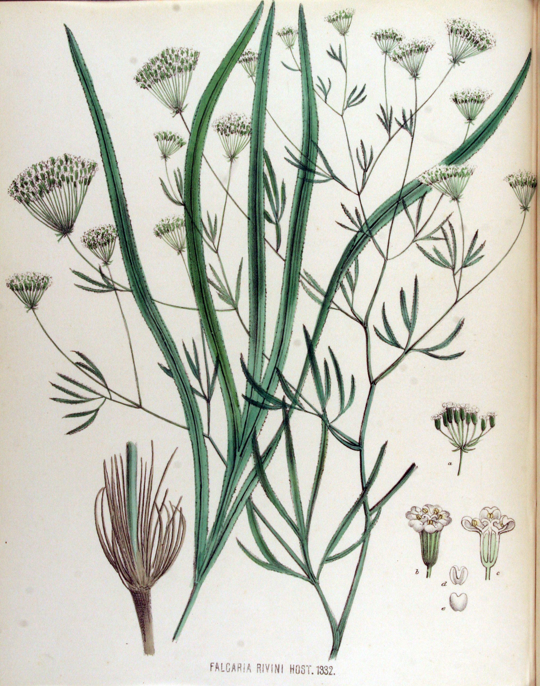 Falcaria vulgaris Bernh. (Syn. Falcaria rivini Host)